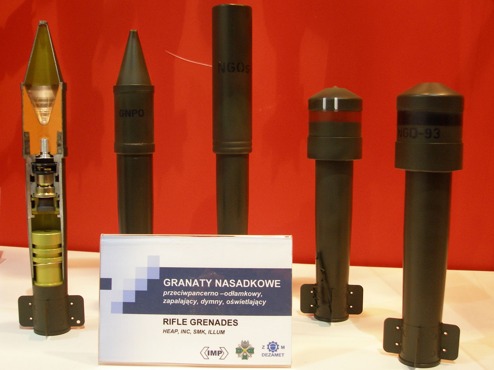 Współczesne polskie granaty nasadkowe produkowane przez ZM Dezamet. Od lewej odłamkowo-przeciwpancerny GNPO (przekrój i kompletny granat), oświetlający NGOs-93, zapalający NGZ-93 i dymny NGO-93